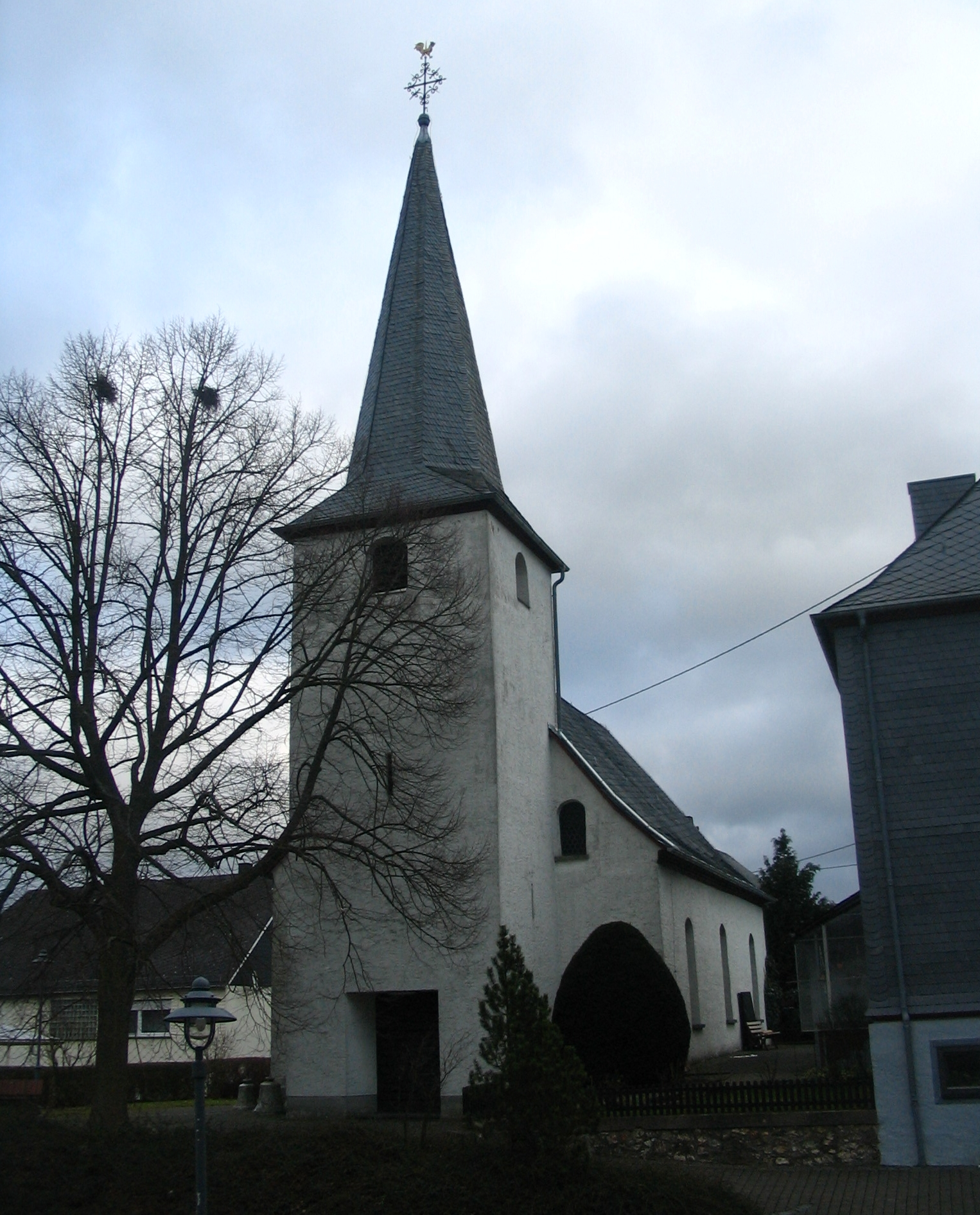 Kapelle Uhler im Hunsrück